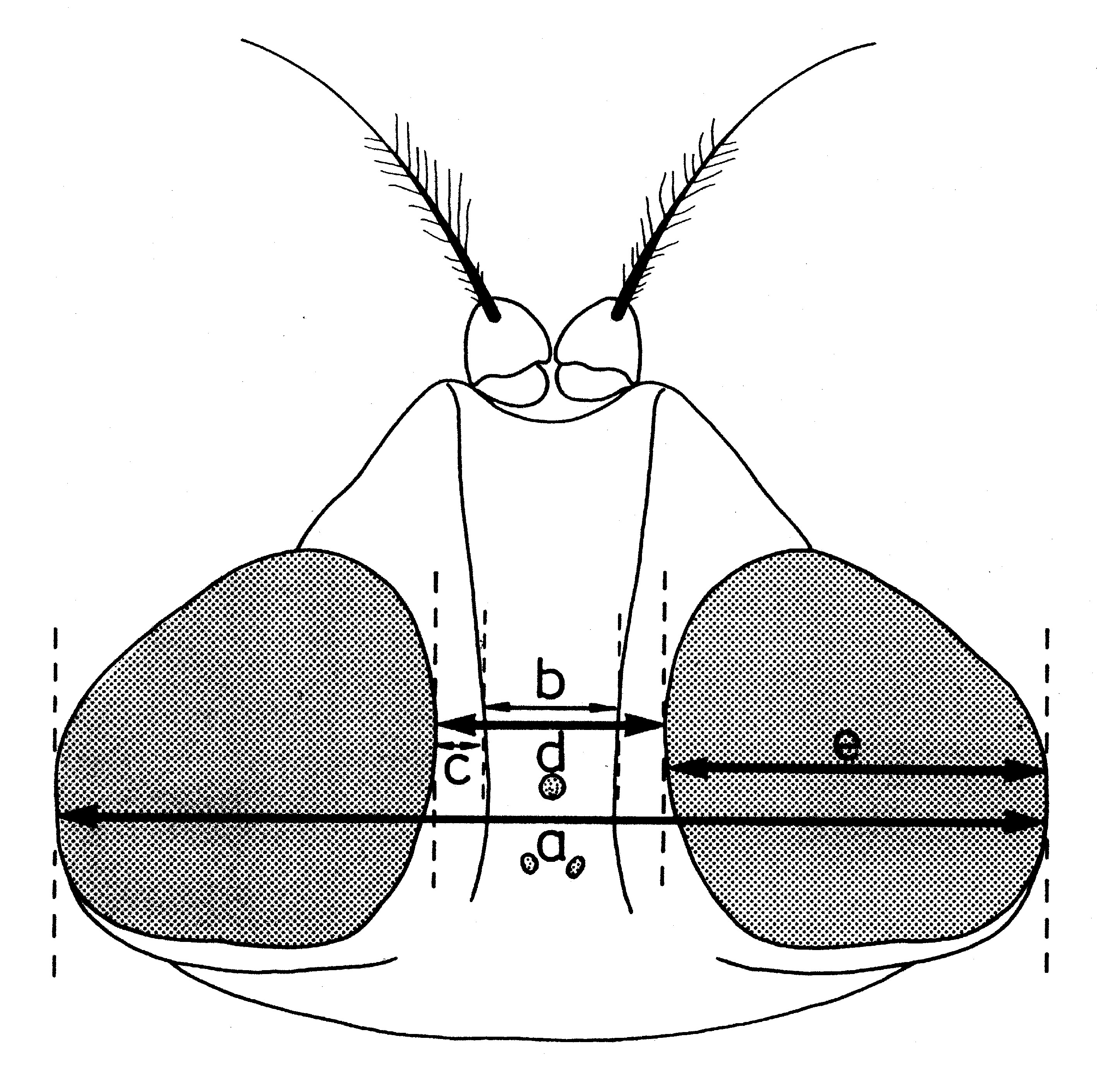 Fig. Parametres dimensionnels de la tete, vu du dessus